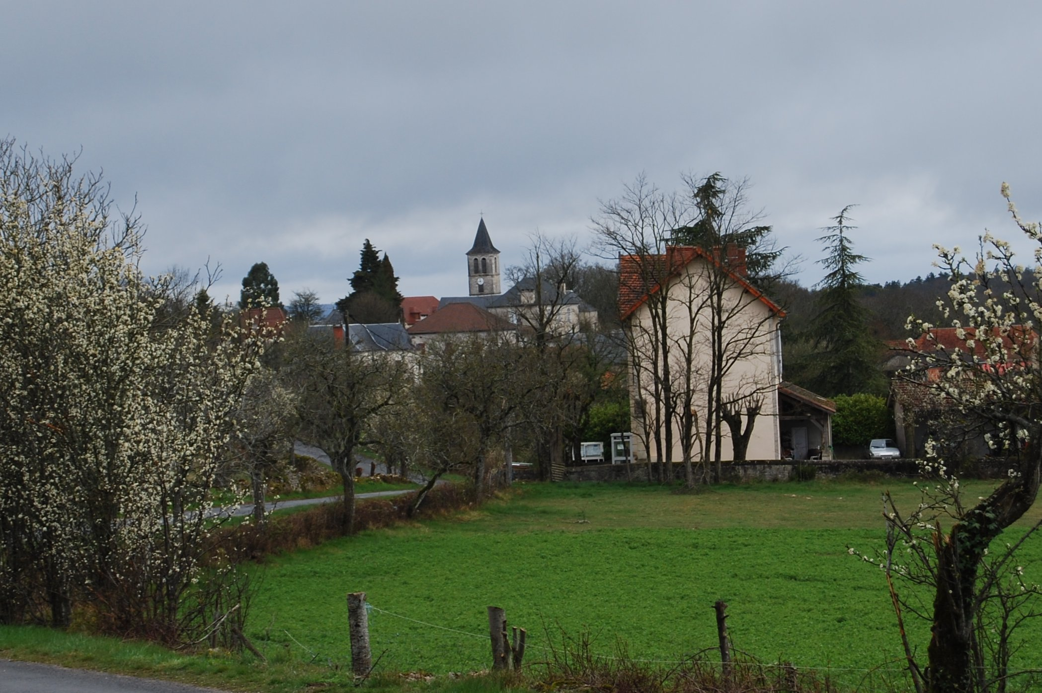 Vue du bourg de Saint-Chels, Lot, France